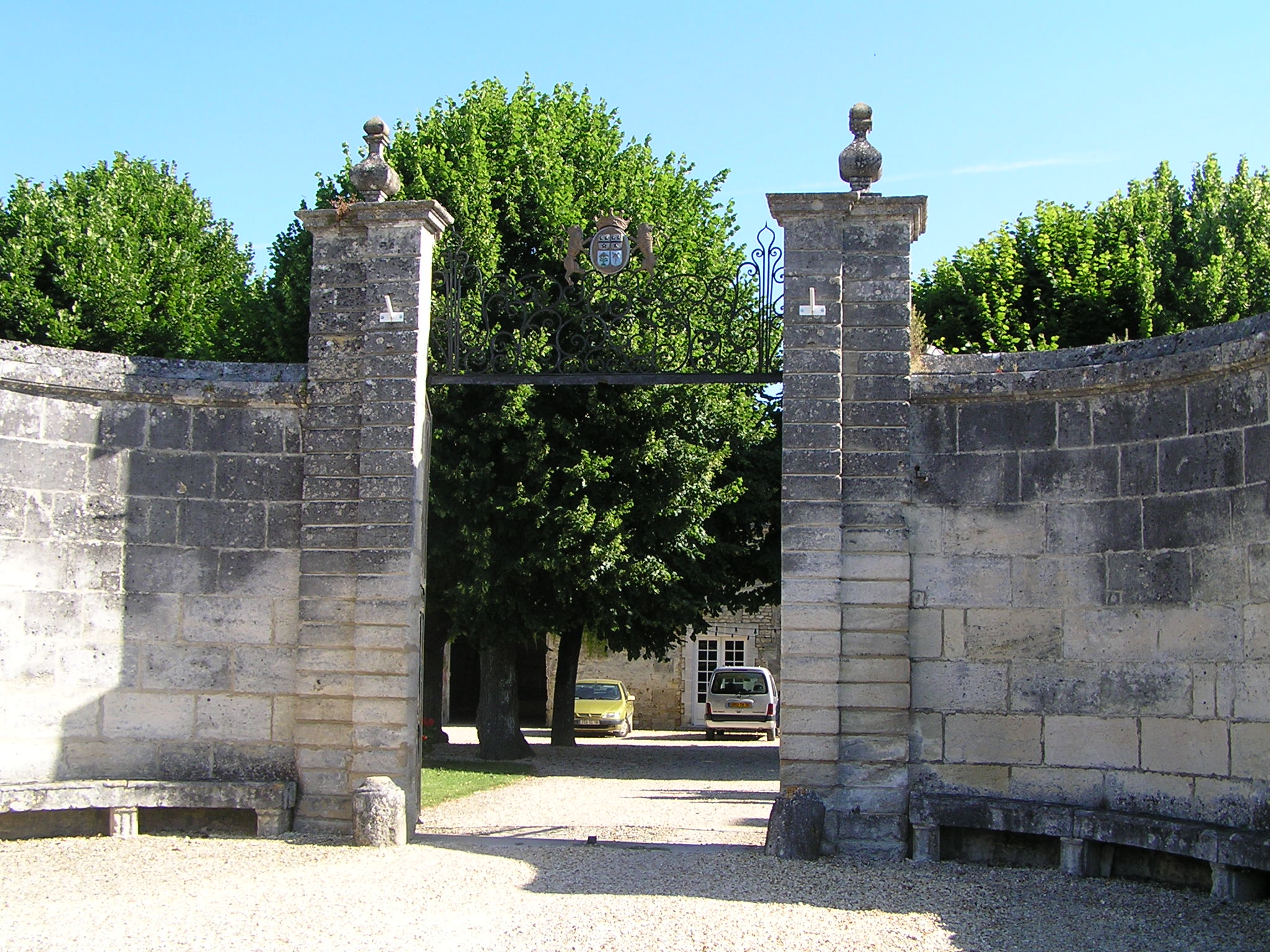 mairie de Gondeville (16), France